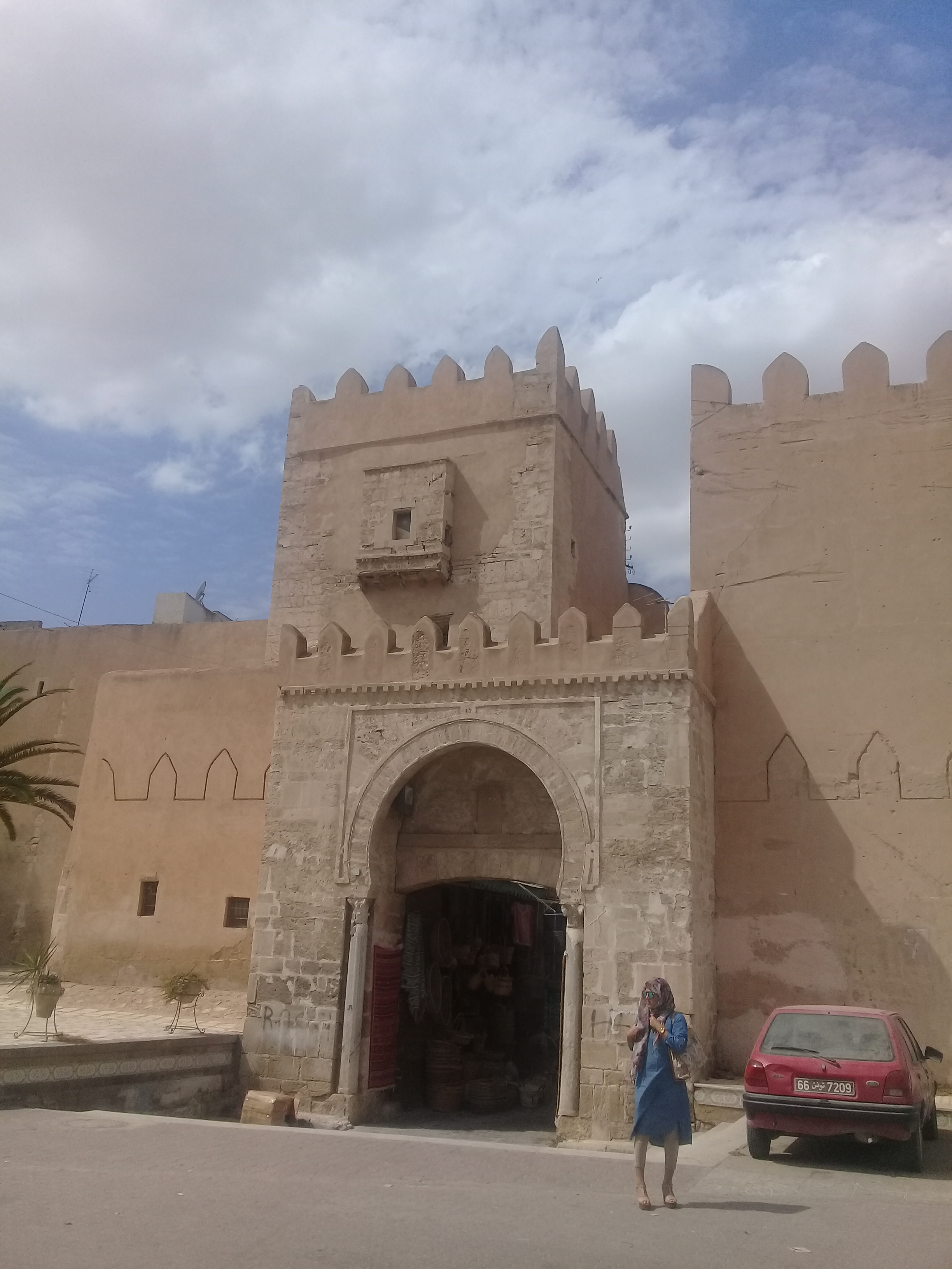 Vue de Bab Diwan, une des voies d'accès à la médina de Sfax